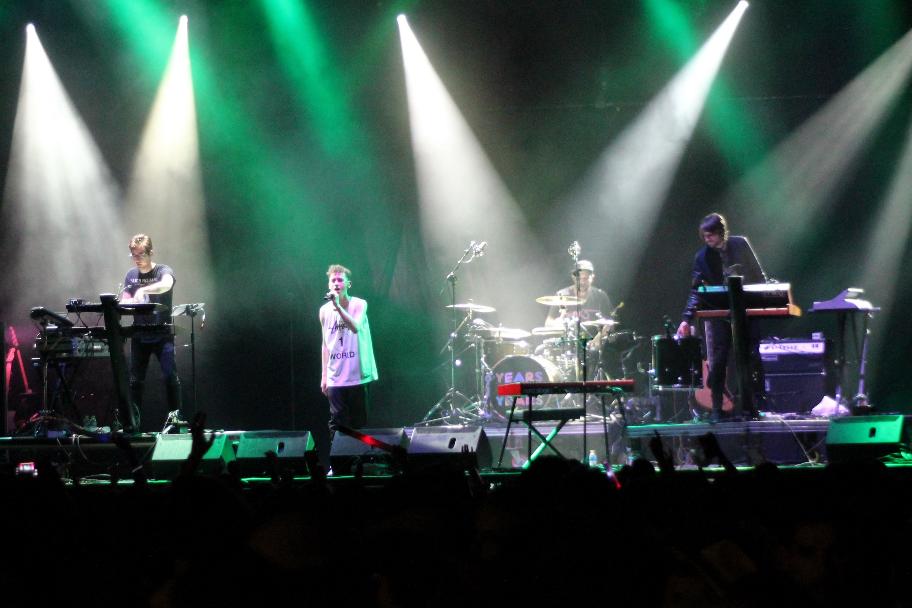 Years & Years es un trío británico de música electrónica formado en Londres. Concierto en el Festival SOS 4.8 2015, en Murcia.